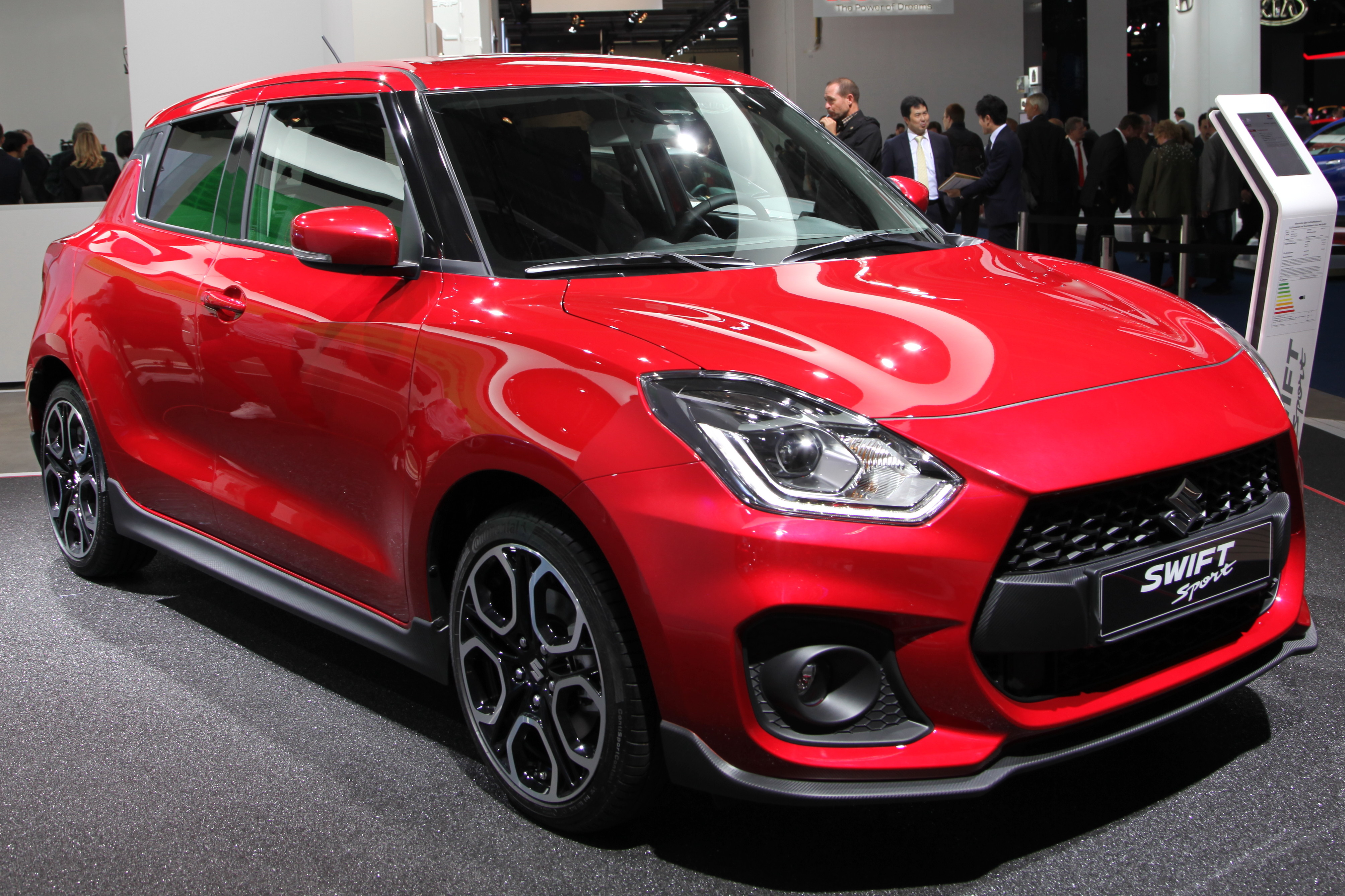 Suzuki Swift Sport auf der IAA 2017